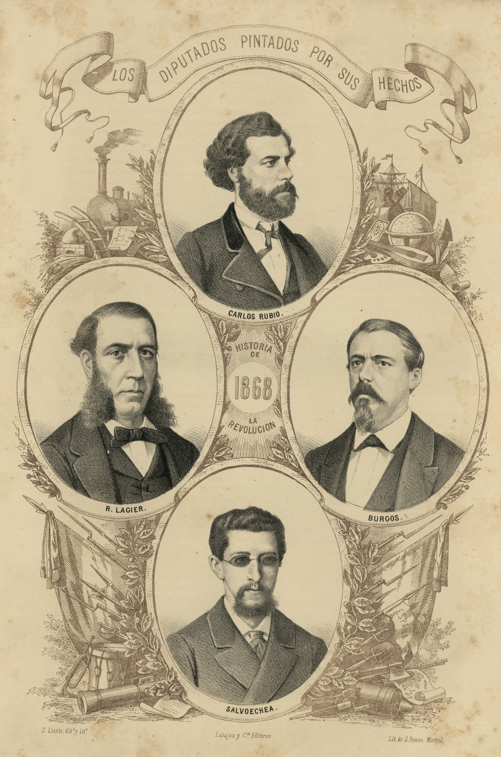 Carlos Rubio, Ramón Lagier, Agustín Burgos, Fermín Salvochea. Litografía de Santiago Llanta para "Los diputados pintados por sus hechos. Colección de estudios biográficos sobre los elegidos por el sufragio universal en las constituyentes de 1869 recopilados por distintos literatos", t. III, Madrid, R. Labajos y Compañía editores, 1870.